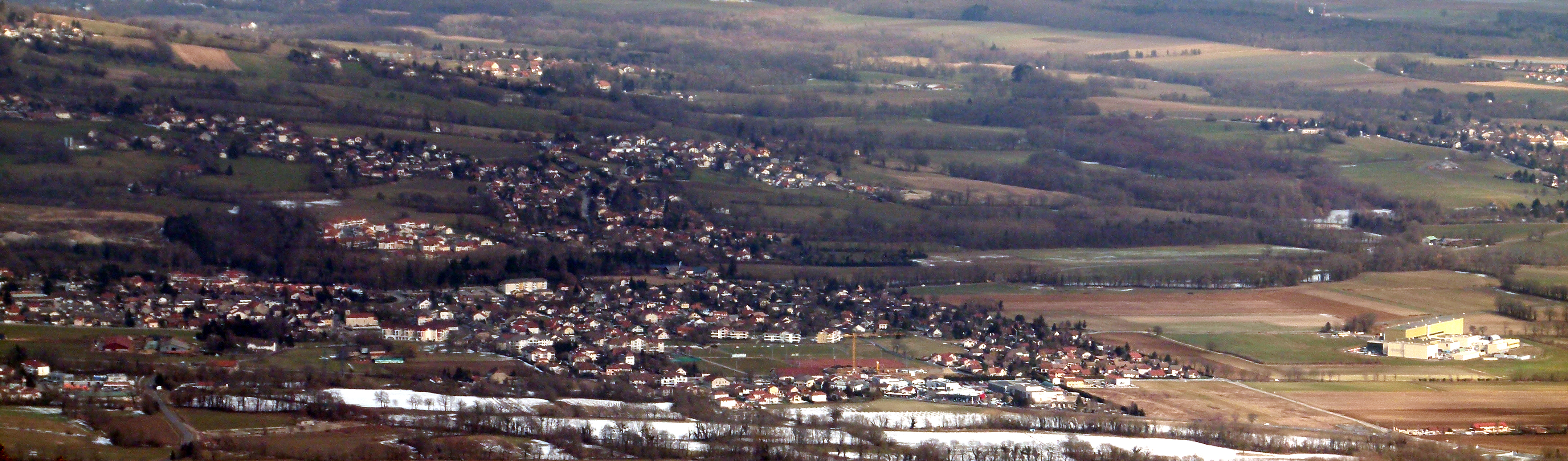 Cessy, Gemeinde im französischen Département Ain, aus der Vogelperspektive, rechts: CERN-Station zum LHC-Tunnel